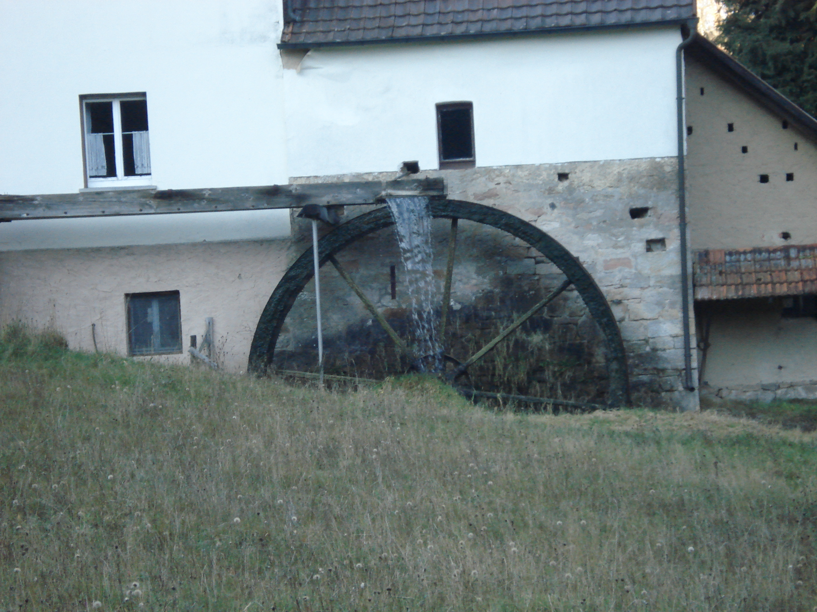 Mühlrad der Jakobsthaler Mühle (betrieben vom Hasselbach)